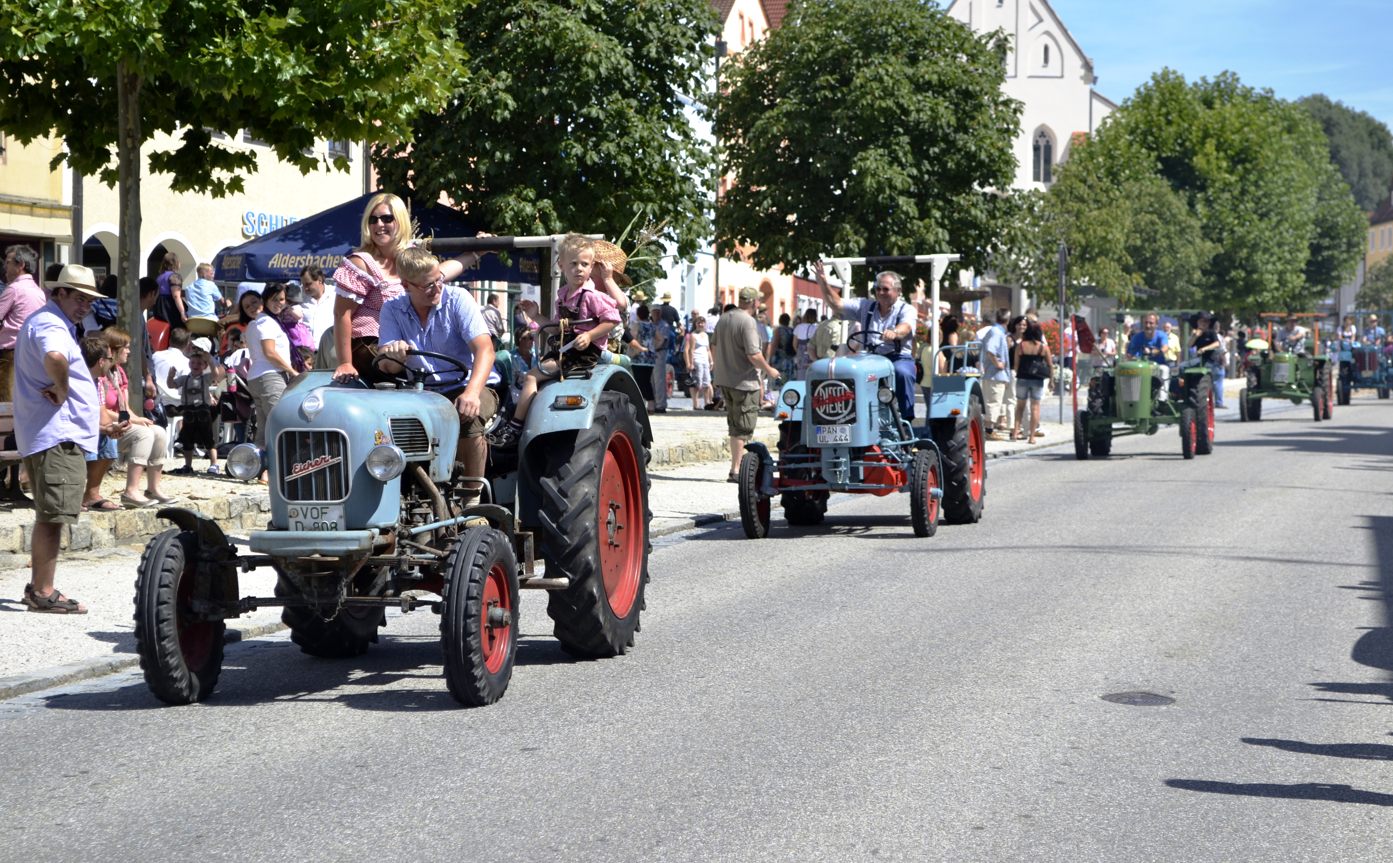 Traktorparade in Aidenbach.